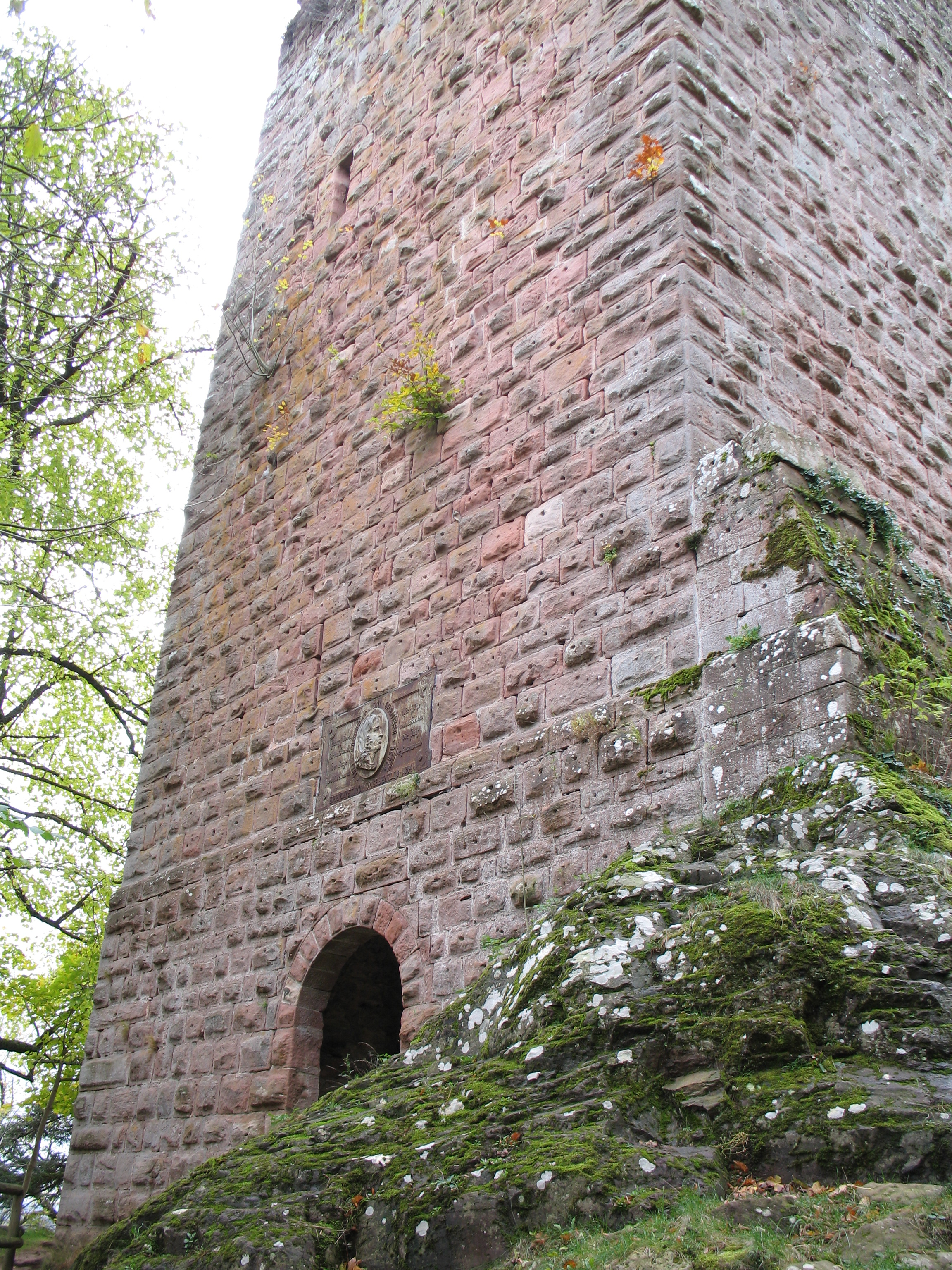 Château du Nideck